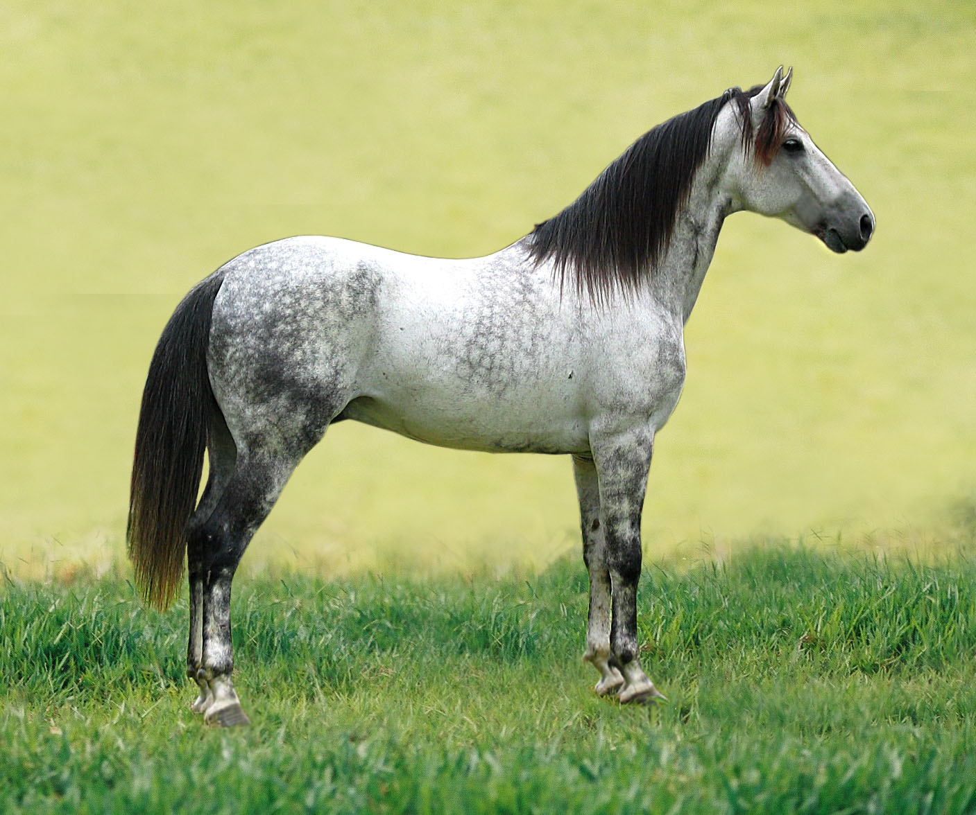 Exemplo de boa conformação morfológica. Corpo, pescoço, aprumos, espádua e cabeça de um Mangalarga Marchador.